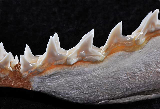 Sphyrna zygaena